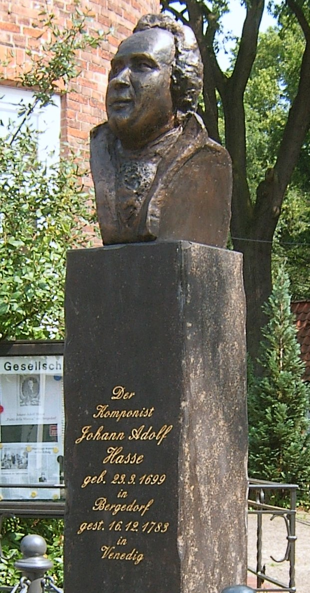 Pomník Johanna Adolfa Hasse v rodném Bergedorfu.